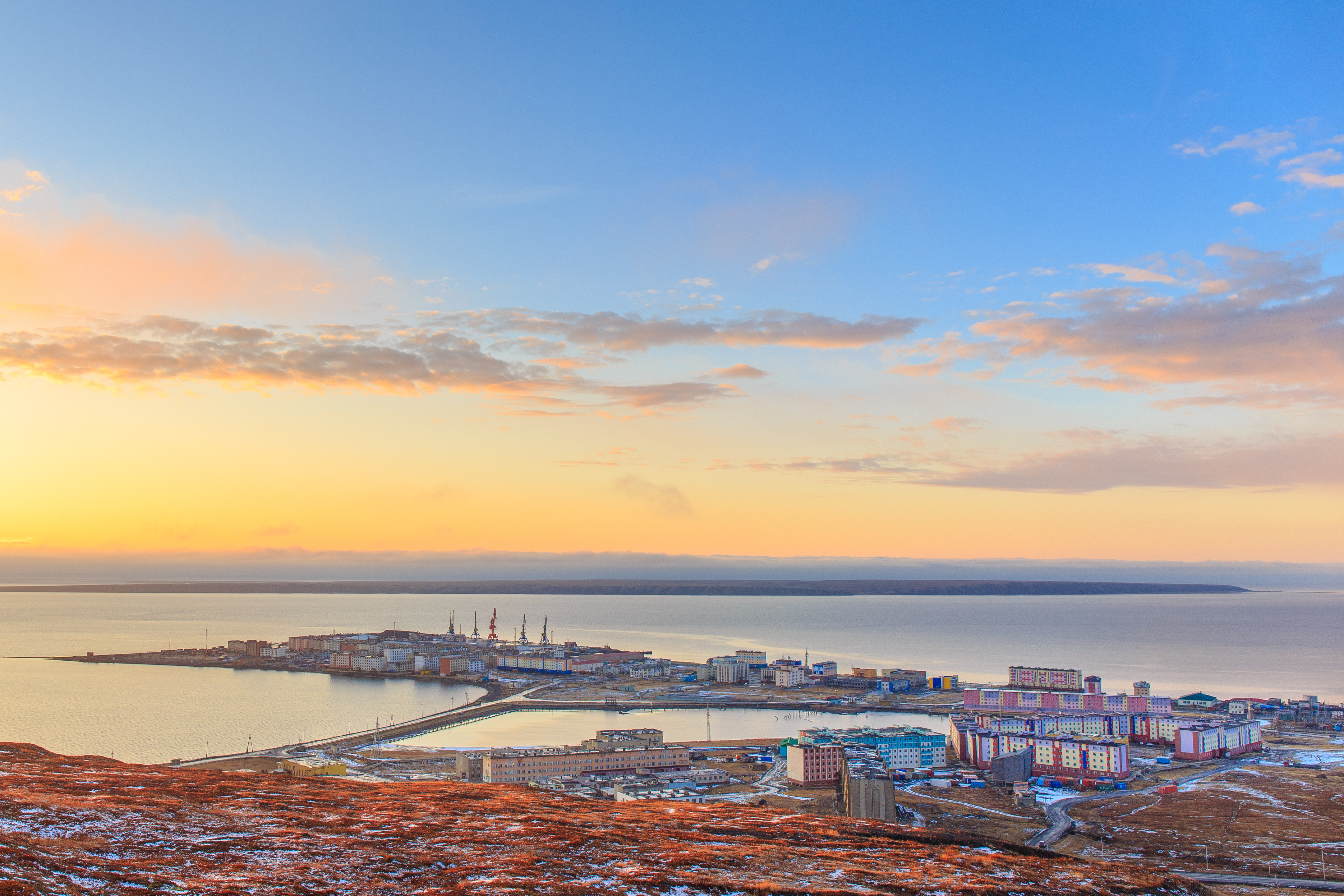 Вид на город Певек со склона сопки Паакинай